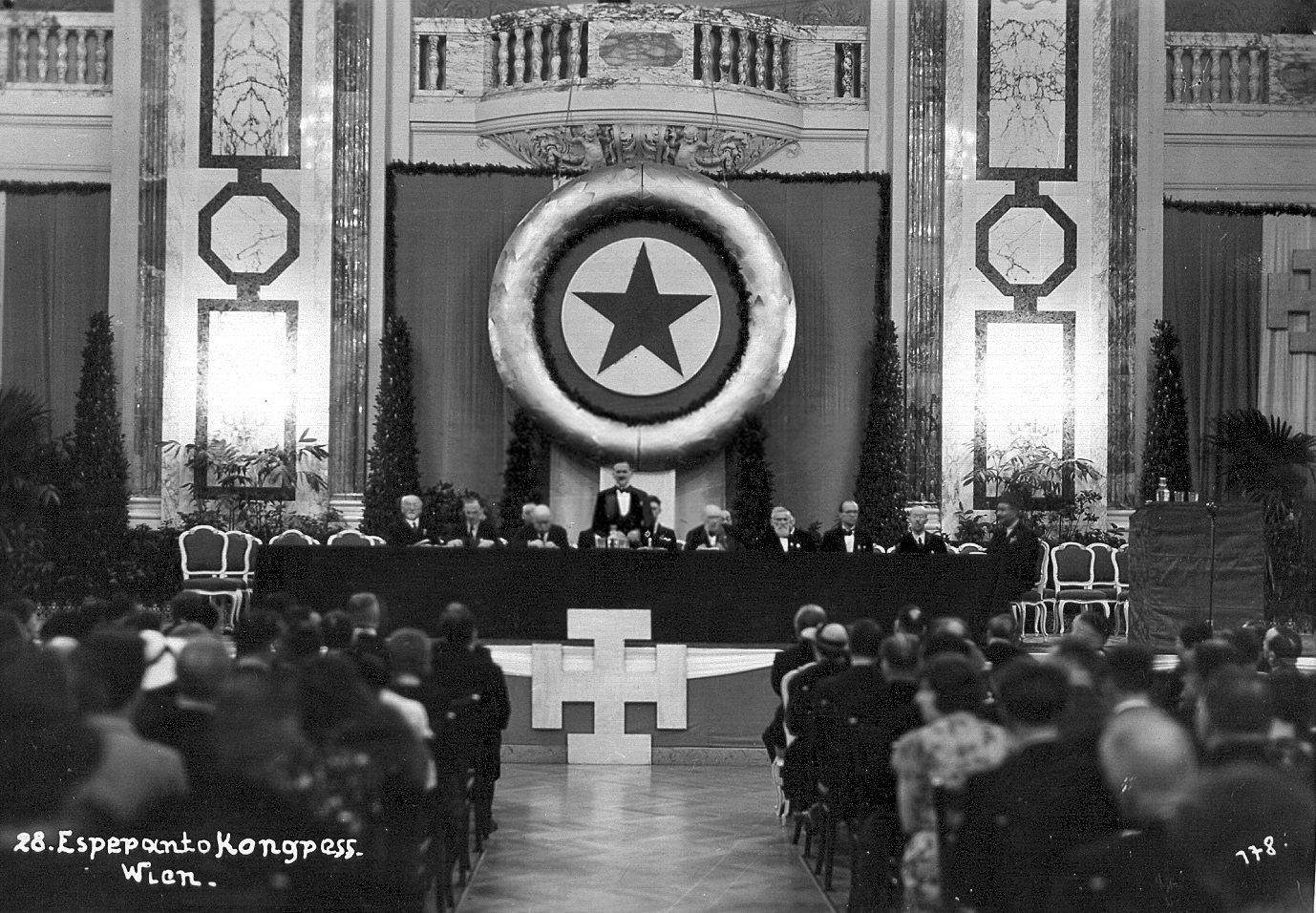 Solena malfermo de la 28-a Universala Kongreso de Esperanto en Festosalono de Hofburg en Vieno. Parolas Hugo Steiner.